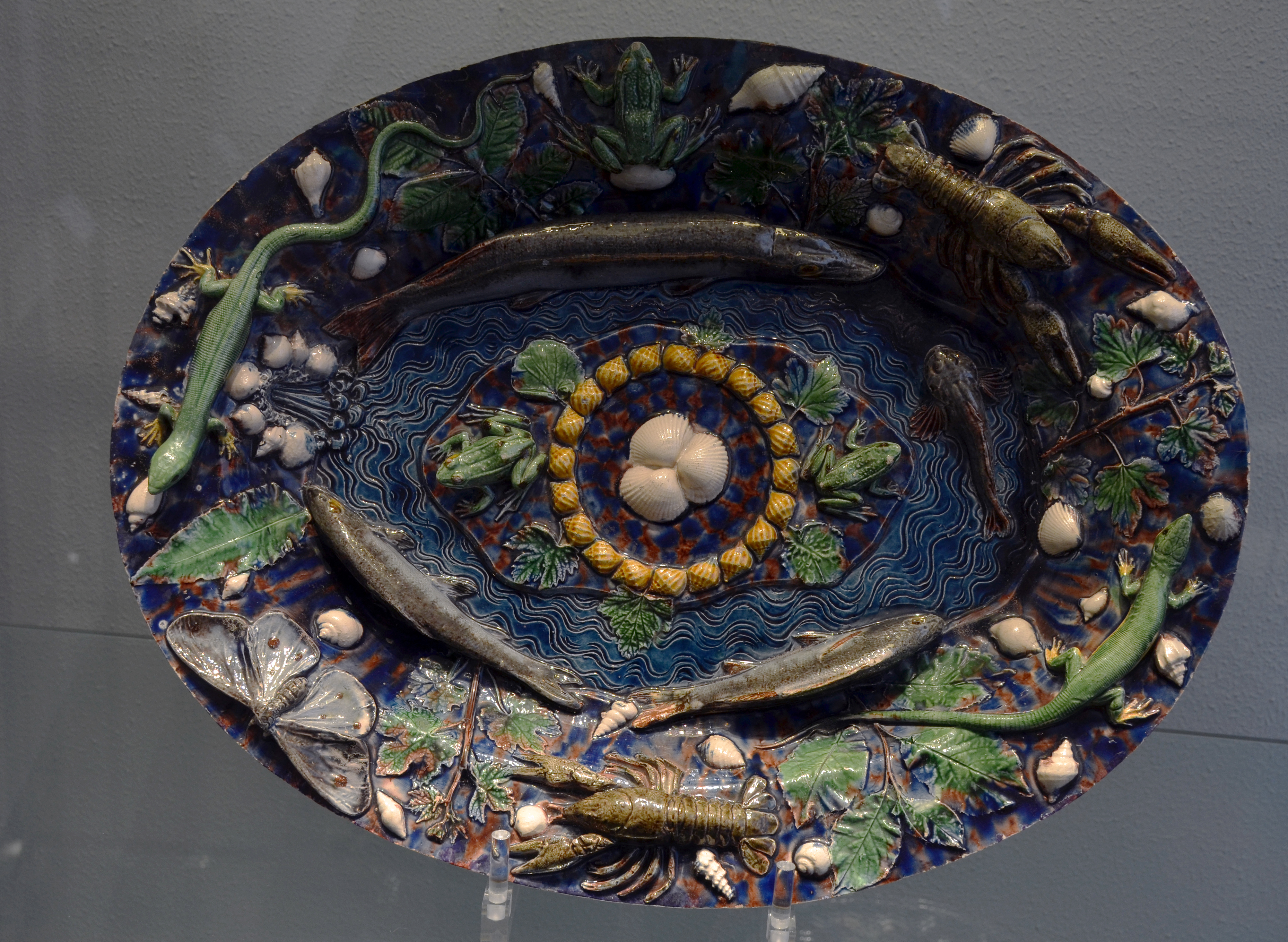 Plat par Bernard Palissy, faïence, Paris 1550. Museum für Angewandte Kunst à Cologne ( Köln ).